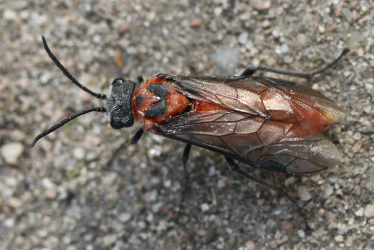 Dolerus cf. triplicatus am 5.4.2017 in der Schwetzinger Hardt